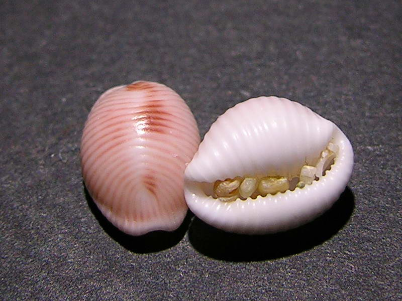 self made Ribeira - Galicia - Spain